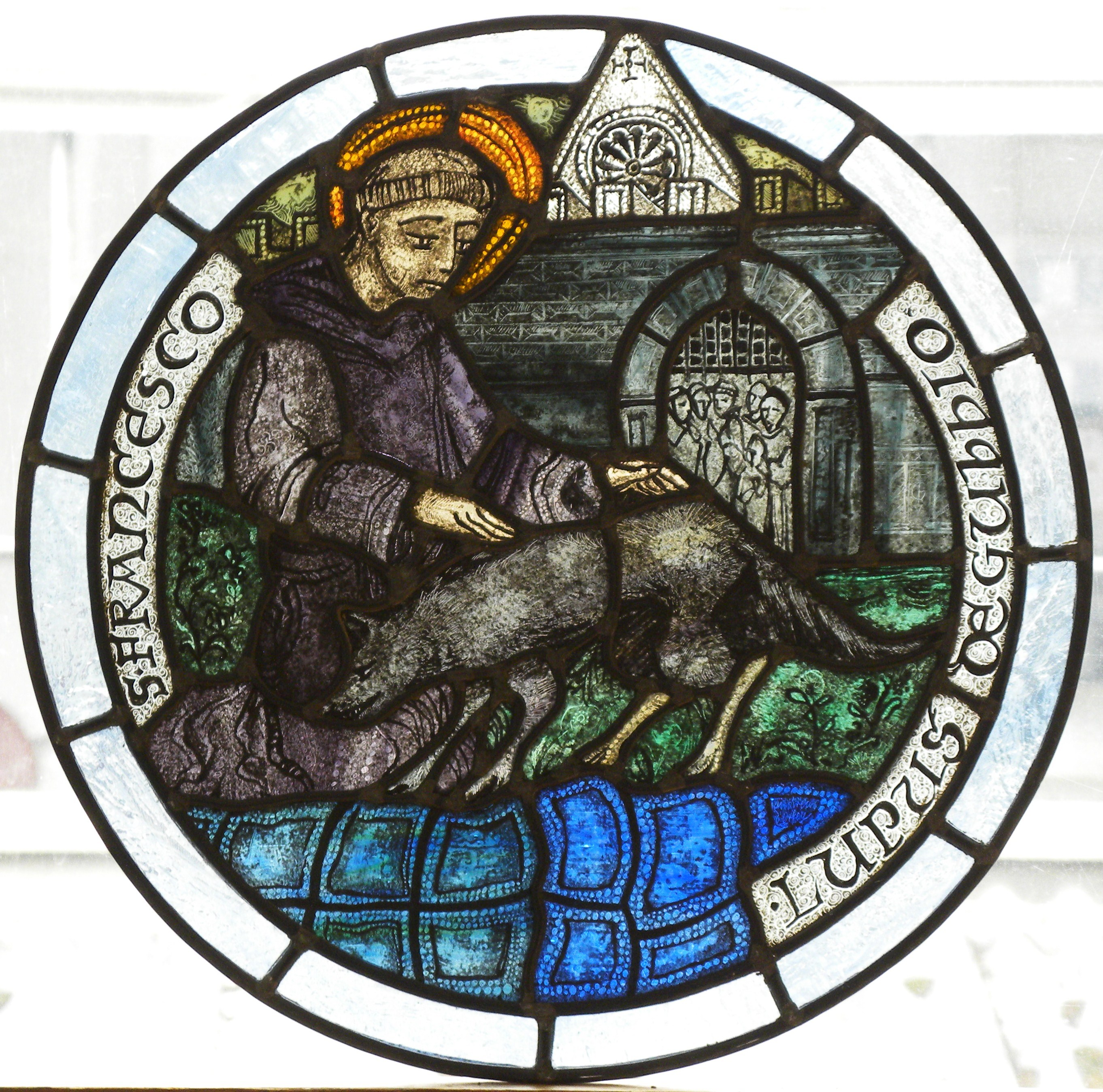 Franziskusfenster, Schruns, Franziskuskapelle Rieder Maisäß. Foto: A. d´Orfey, Kunst im Licht, München, 2011